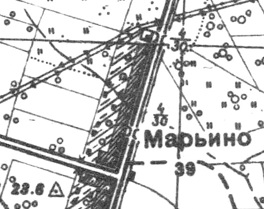 Топографическая карта Ленинградской области, квадрат О-35-12-Б-г (Петергоф), деревня Марьино